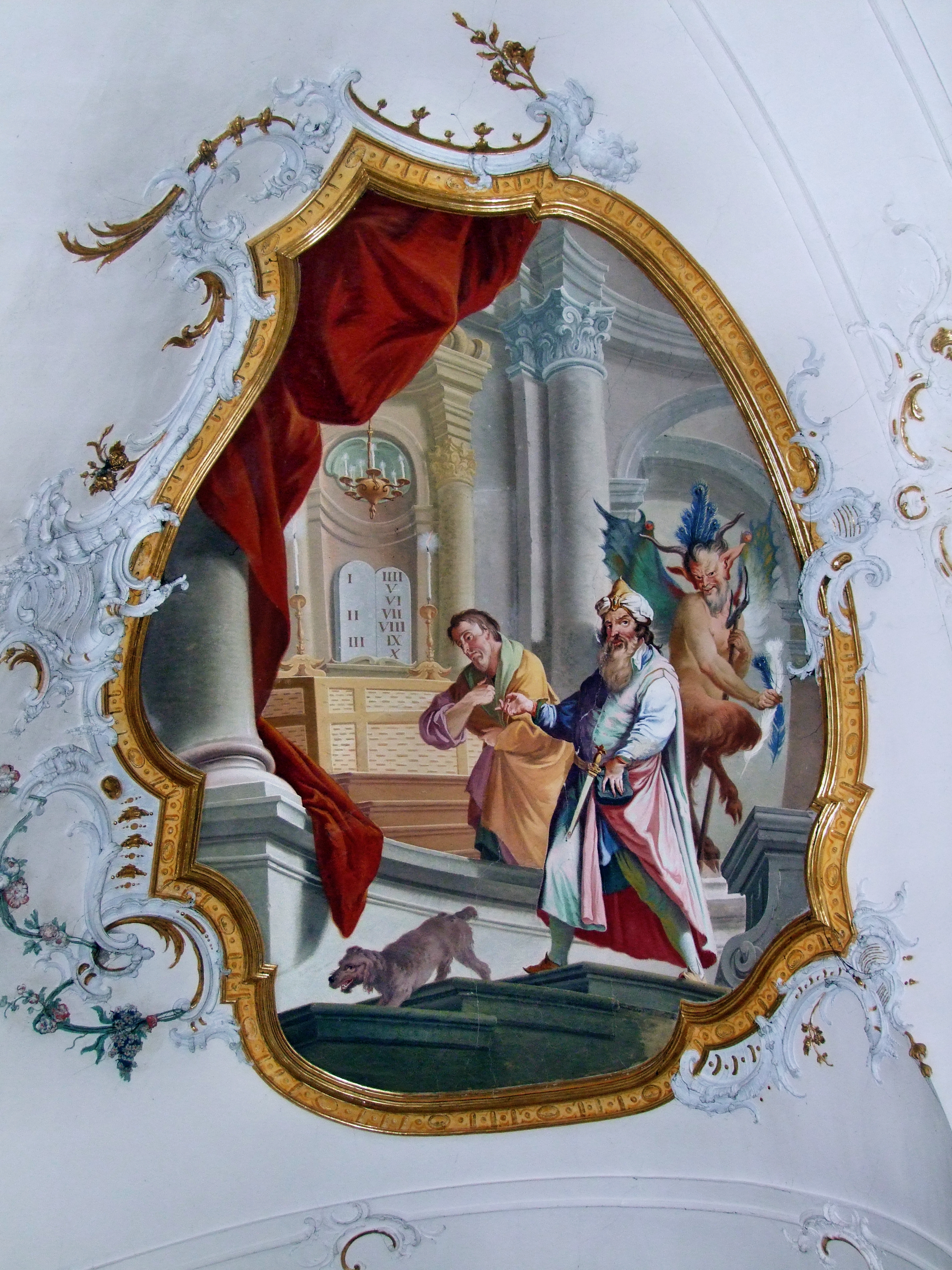 Pharisäer und Zöllner - Fresko (F3), Basilika Ottobeuren